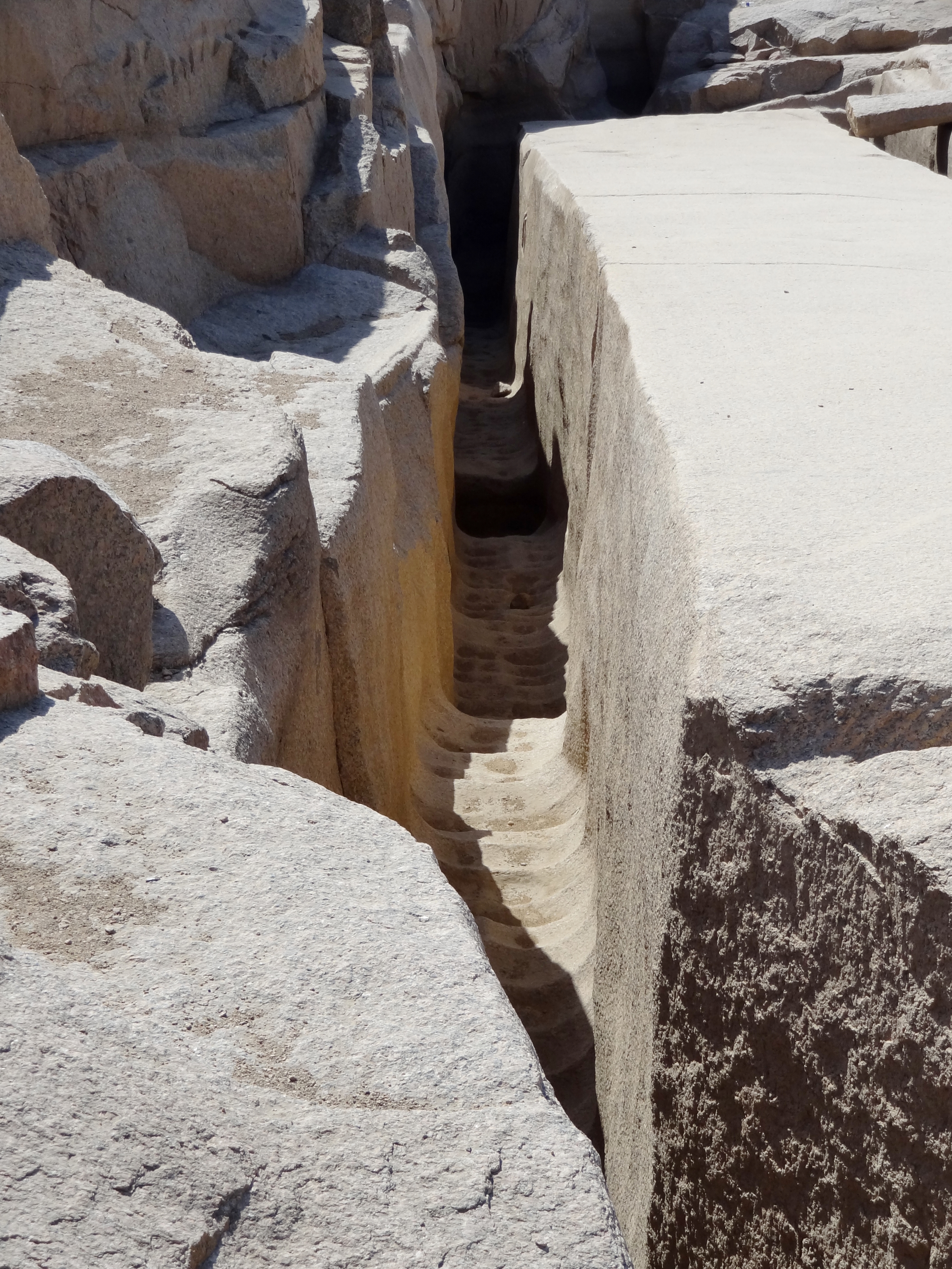 Unvollendeter Obelisk im Steinbruch von Assuan, Ägypten